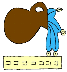 Escudo o Glifo de Tlahuelilpan, Hidalgo